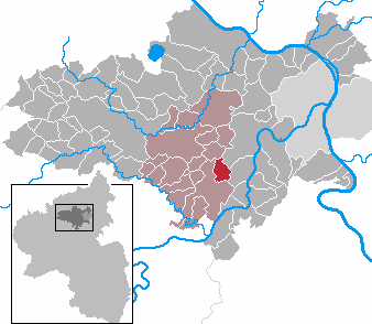 Kalt in Rhineland-Palatinate - district Mayen-Koblenz